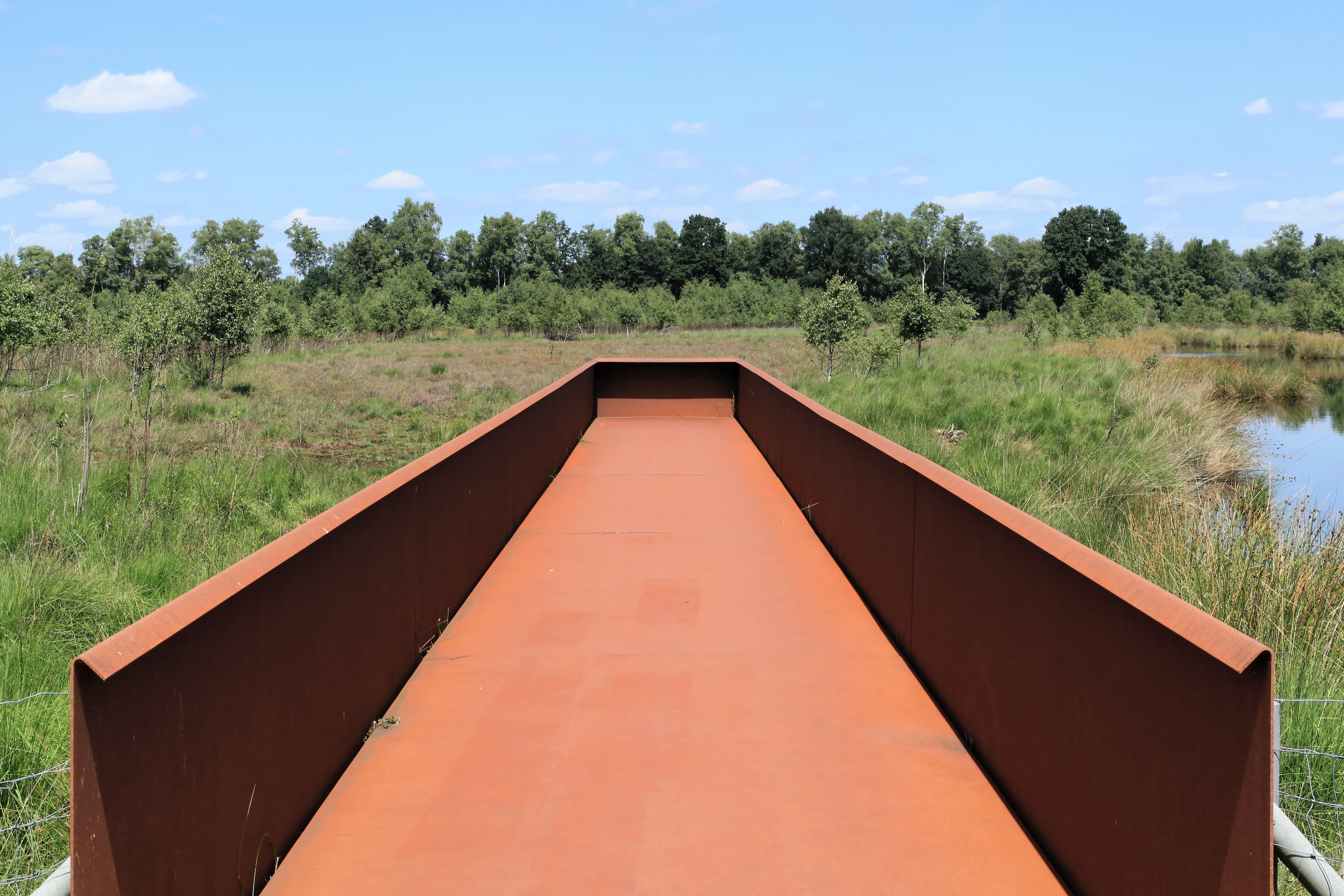 Moorinfopfad Esterwegen im Kuhdammoor des Naturschutzgebietes Melmmoor/Kuhdammoor, Hinterm Busch in Esterwegen